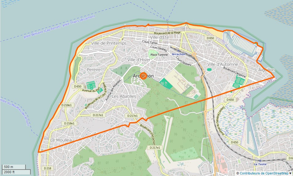 Arcachon Limite communale This map may be incomplete, and may contain errors. Don't rely solely on it for navigation.